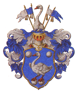 Vaakuna